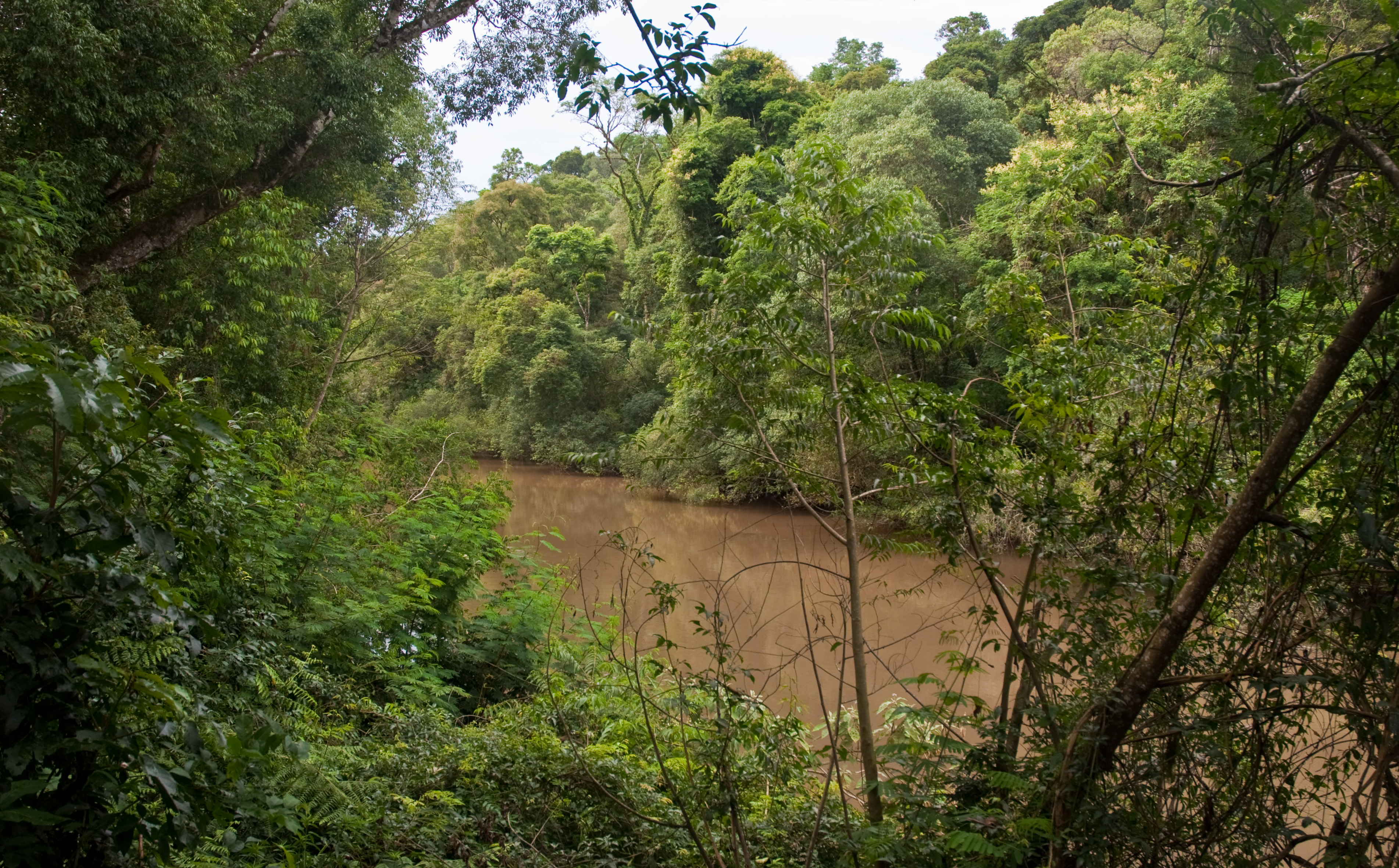 Reserva da Biosfera Yaboti, em Misiones, Argentina.